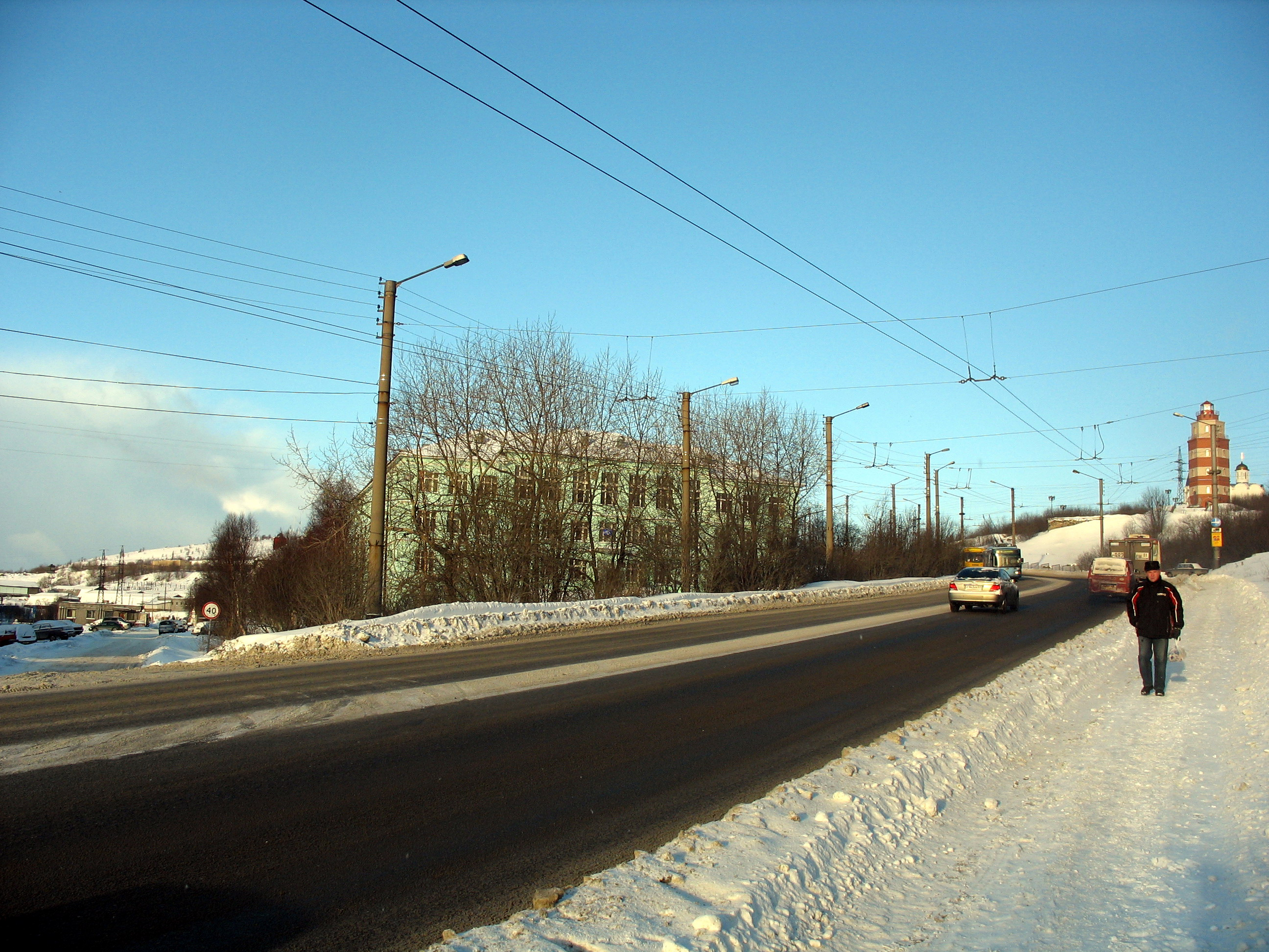 Ул. Челюскинцев (гора)